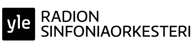 Radion Sinfoniaorkesterin logo